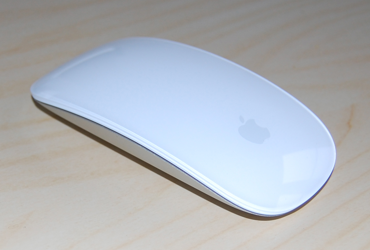 Foto der Apple Magic Mouse